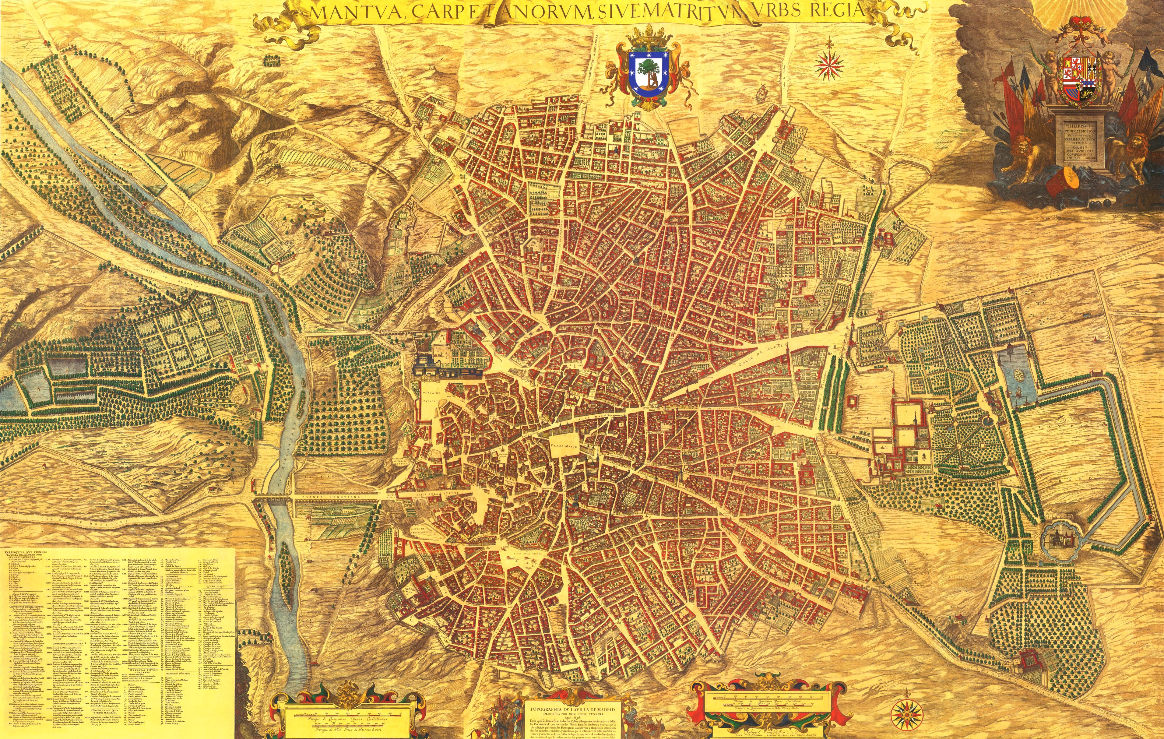 Plano de la villa de Madrid dibujado por Pedro Teixeira Albernaz en 1656, por encargo de Felipe IV de España. Se identifican sus calles, plazas y edificios, muchos señalados con sus nombres. El plano está realizado en perspectiva caballera, de sur a norte. Está grabado en 20 planchas de 45x56 cm cada una, midiendo 2,85 x 1,80 metros, a una escala de 1:1.800.